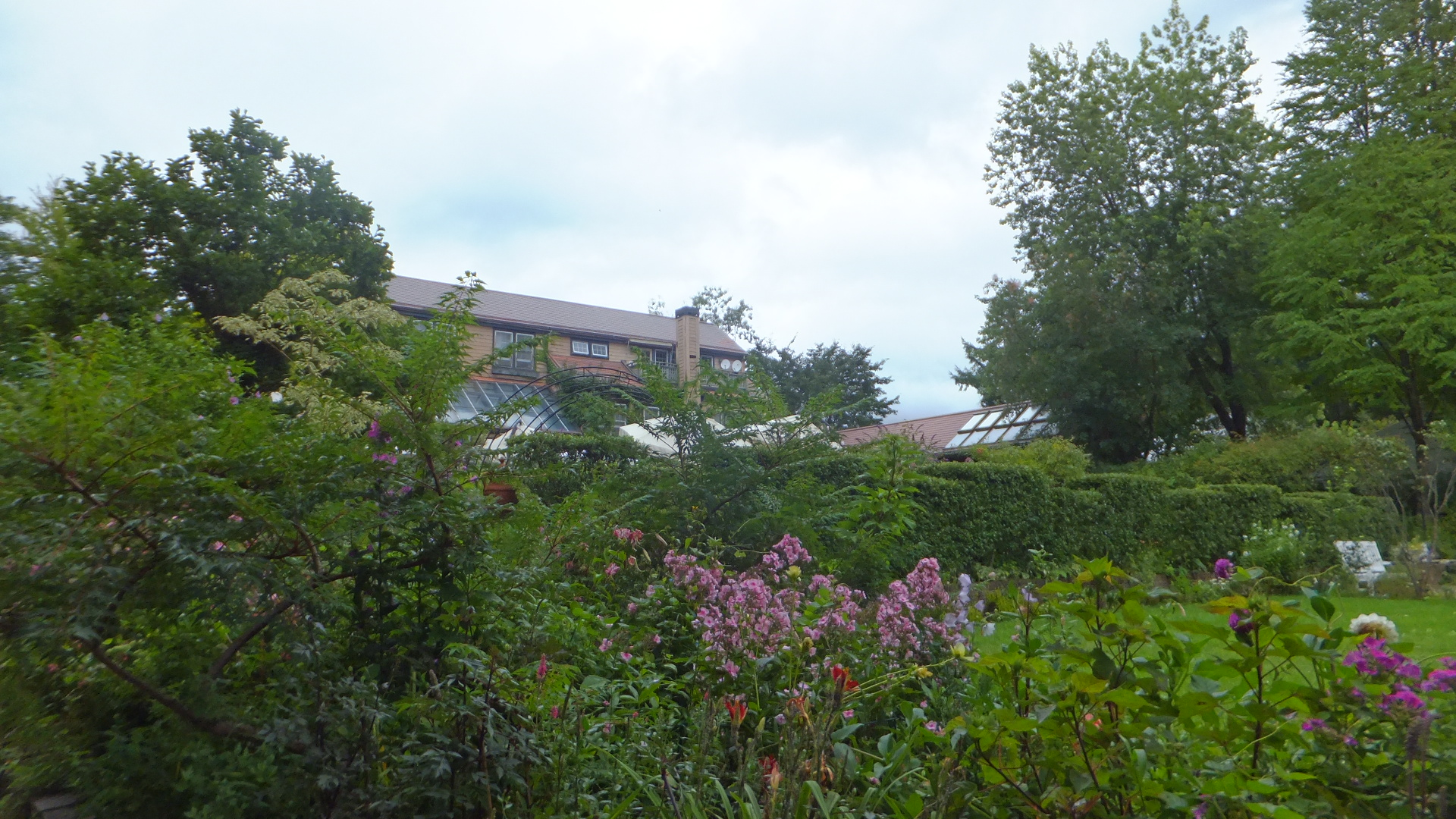 蓼科高原バラクライングリッシュガーデン